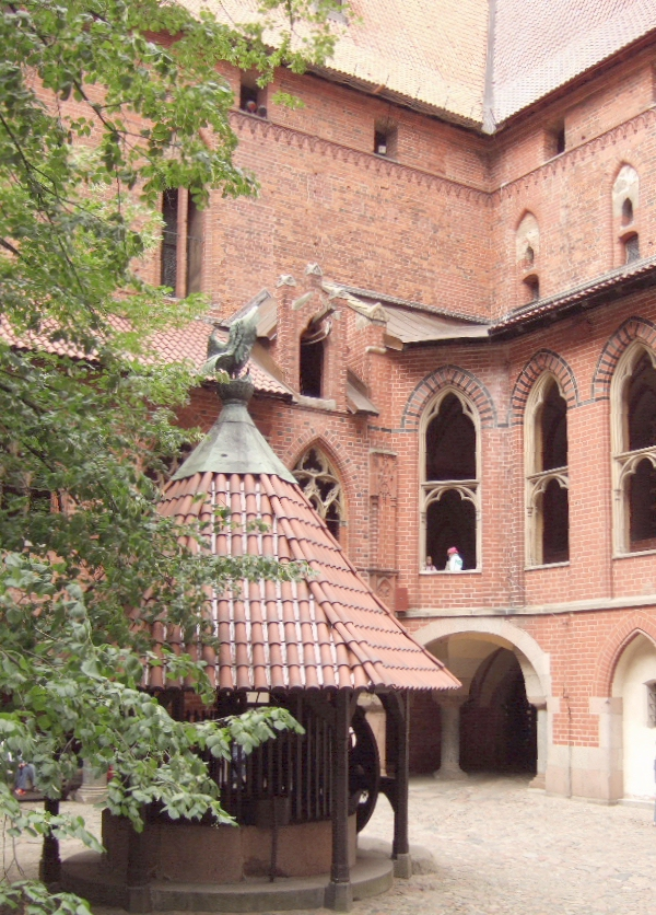 Ordensburg Marienburg - Innenhof mit Brunnen